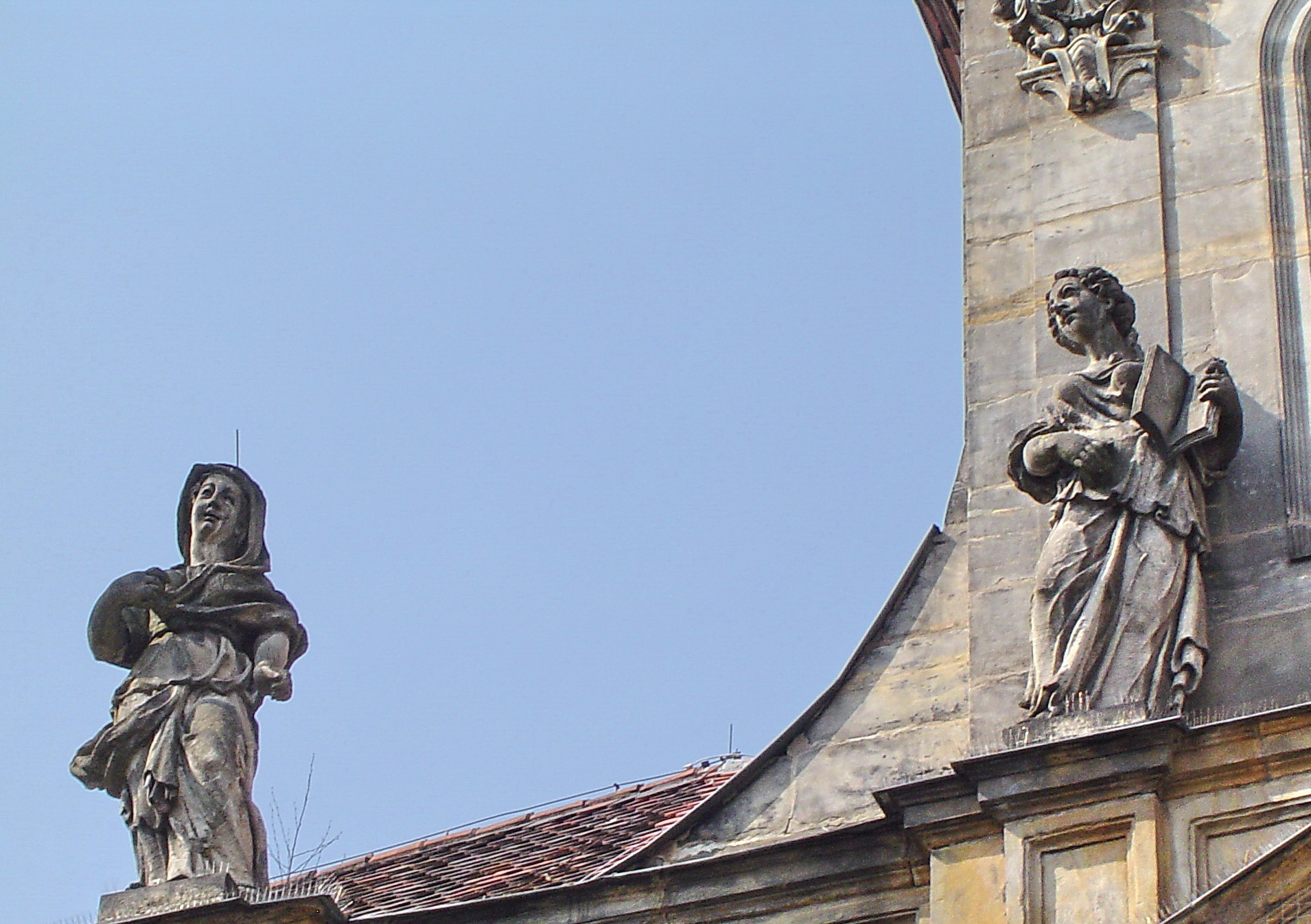 Bayreuth, Spitalkirche, Attika, 2 Sandstein-Skulpturen (weibliche Gestalten, Sinnbilder christlicher Tugenden) von Johann Gabriel Räntz (1750) (linke Seite).